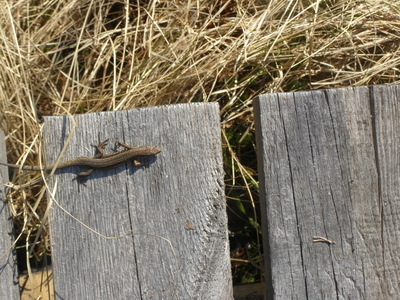 Sisalik Meenikunno raba laudteel